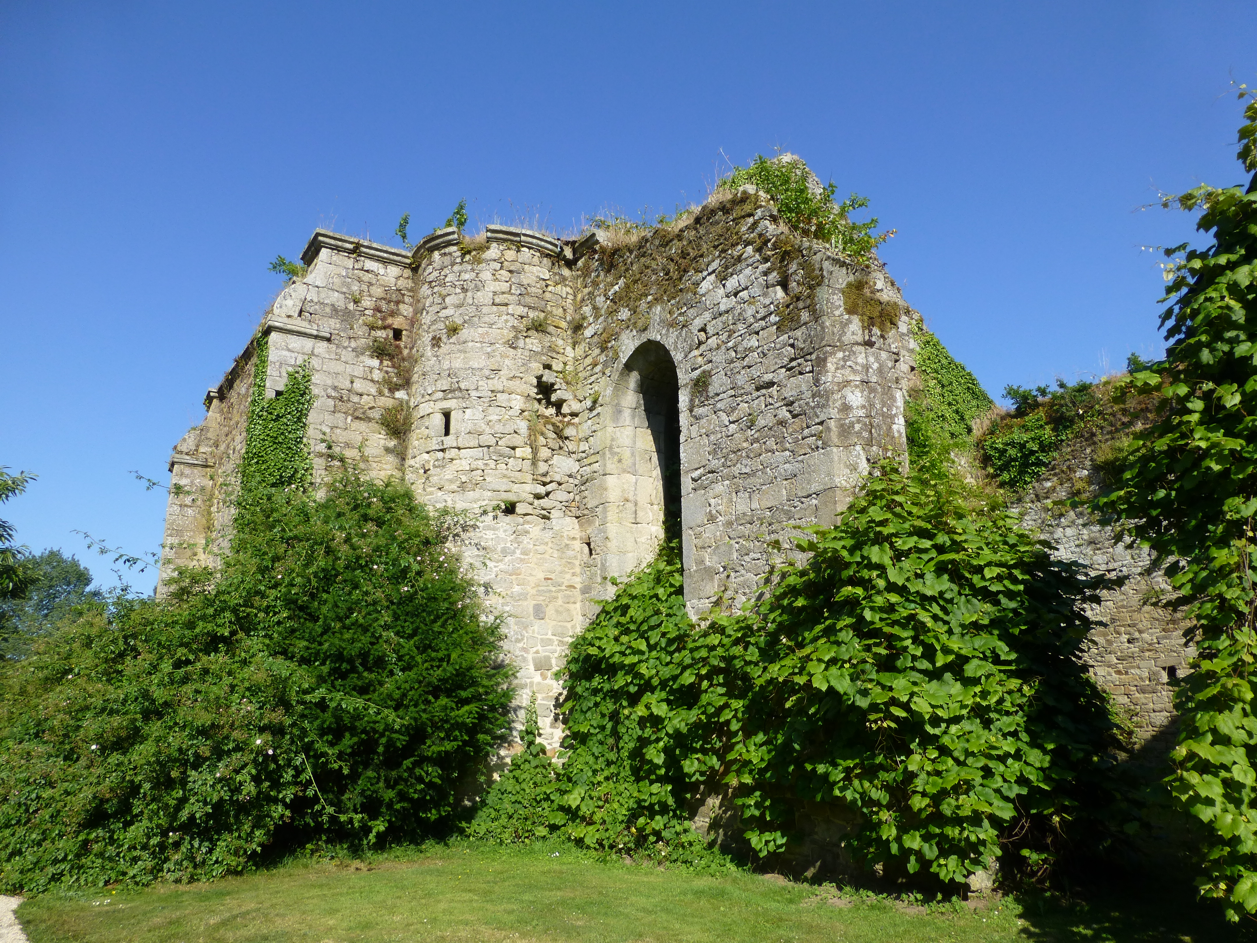 Abbaye Sainte-Croix, Guingamp, Cotes d'Armor, France .